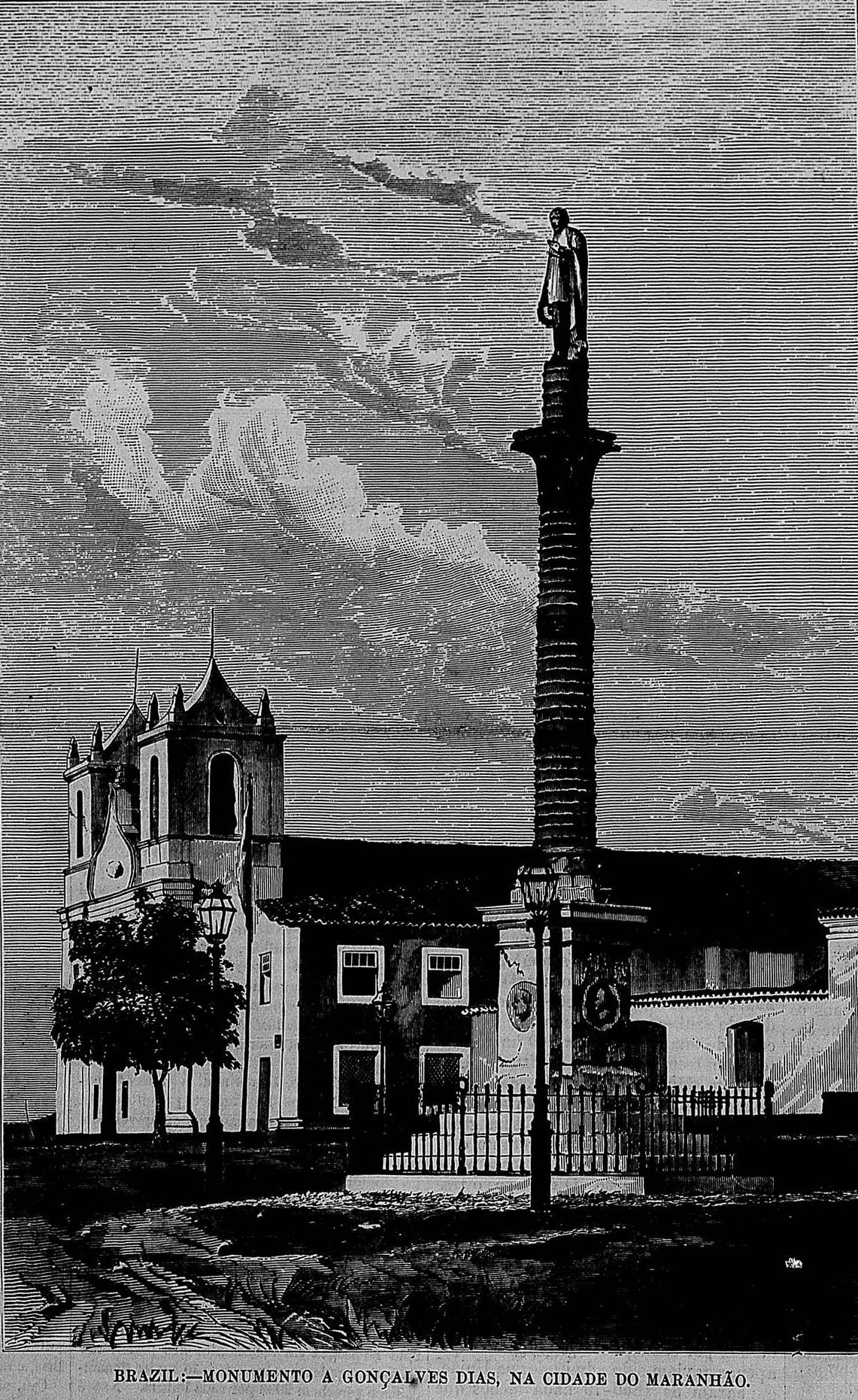 Ilustração do monumento ao poeta e escritor Gonçalves Dias, em São Luís, Maranhão.